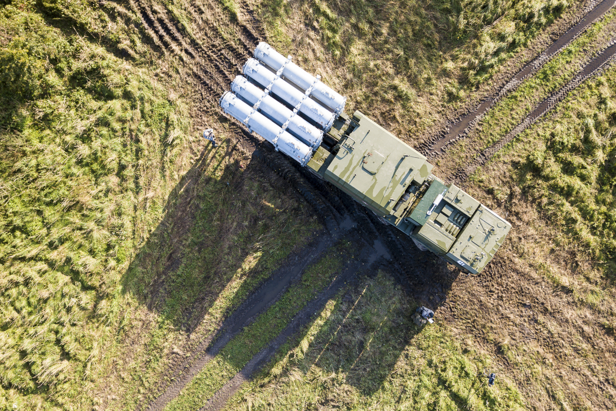 Боевые стрельбы ракетчиков Балтийского флота в рамках учения «Запад-2017».